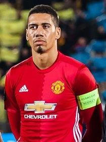 «Манчестер Юнайтед» перед матчем Лиги Европы УЕФА против «Ростова»